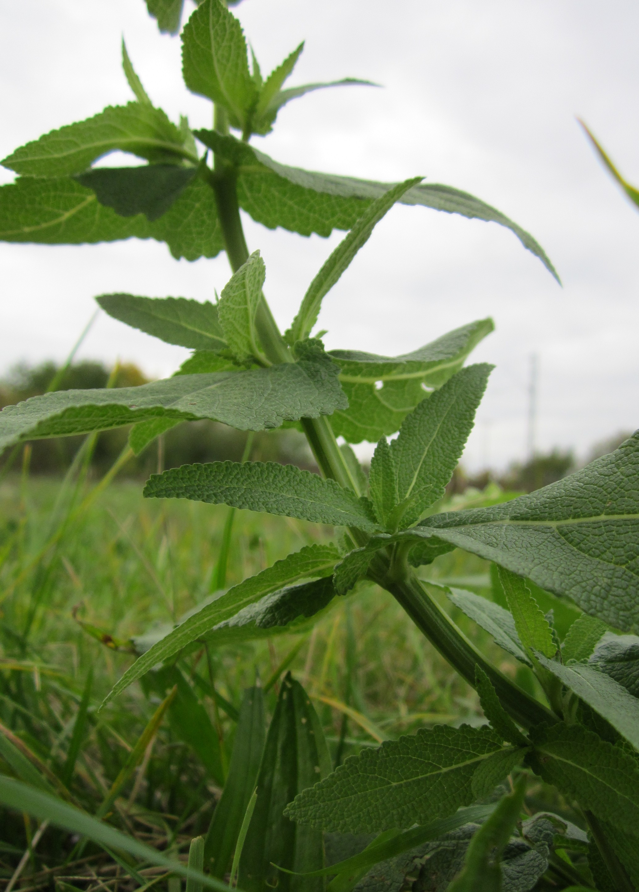 Hain-Salbei (Salvia nemorosa) bei Neulußheim (Gemarkung Altlußheim)